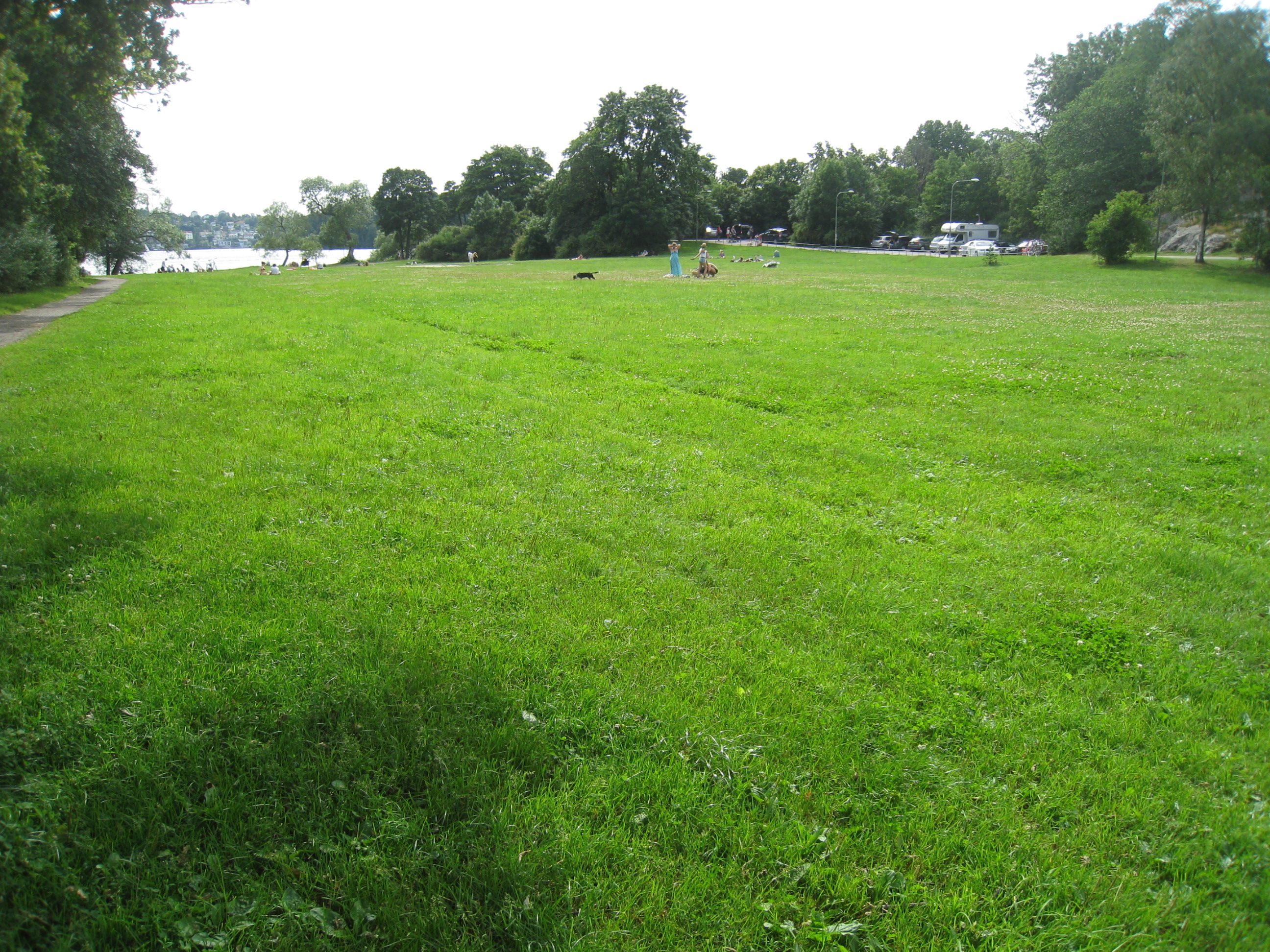 Ålstensängens natur vid Mälaren i stadsdelen Ålsten i södra Bromma väster om Stockholm. Vy mot söder ner mot Mälaren. Till höger gränsar Per Albins Väg och Ålstensparken.